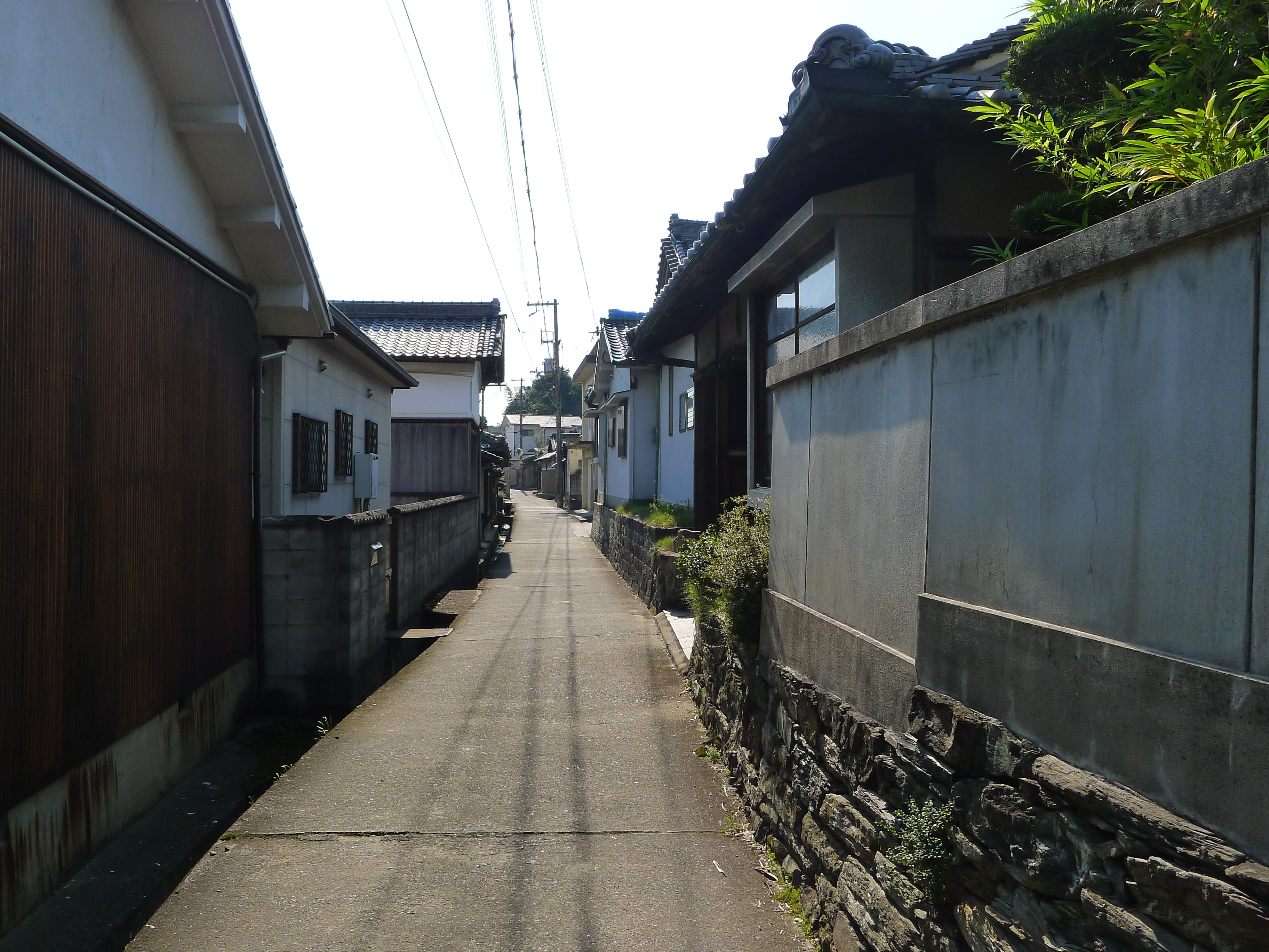 熊野古道紀伊路が通る平尾集落（和歌山県和歌山市）